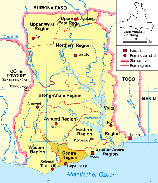 politische Karte Ghanas (Central Region hervorgehoben) Zeichner: Domenico-de-ga Datum: 12. Januar 2006